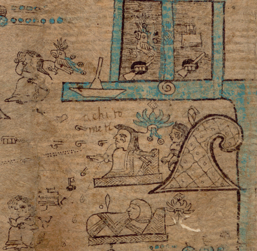 En el centro se observa a Achitometl, gobernante de Colhuacan ("Lugar del cerro curvo") que se ve a espaldas del personaje. En la esquina superior izquierda aparece Atotoztli, hija de Achitometl, en la esquina inferior se ve su otra hija, Ilancueitl.